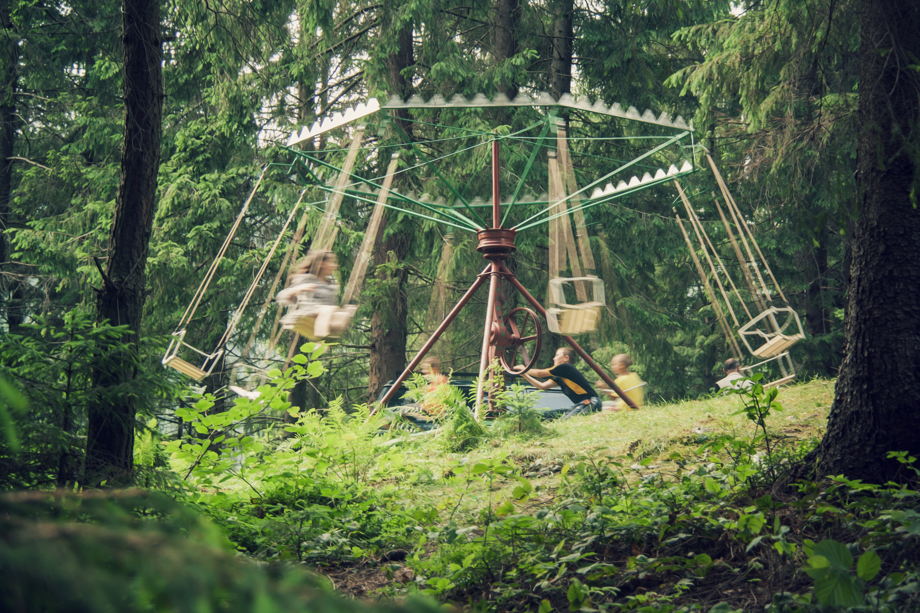 Carrousel. Verkhnii Yaseniv, Ucrania